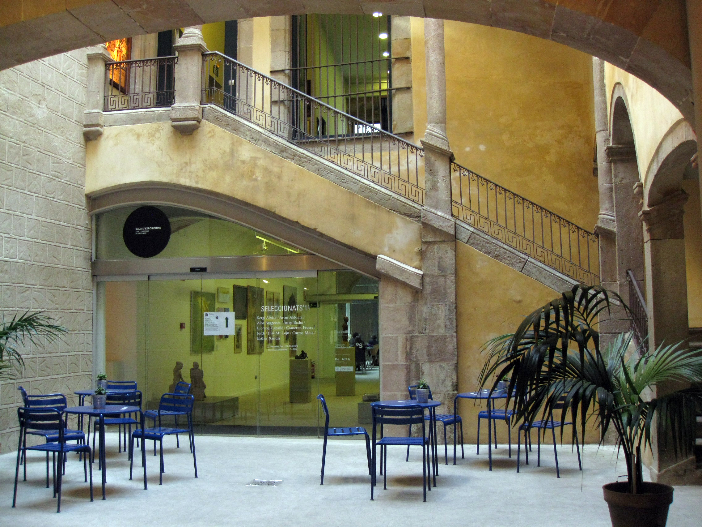 Palau situat al carrer dels Mercaders núm. 42, que conforma una sola parcel·la amb l'edifici de la plaça de les Beates núm. 2 i el carrer de les Beates núm. 2 (Barcelona). A la imatge, el pati del palau.